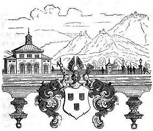 Gravure représentant la gare de Colmar, sur le chemin de fer de Strasbourg à Bâle